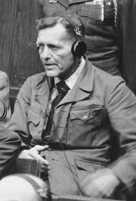 Lutz Graf Schwerin von Krosigk.